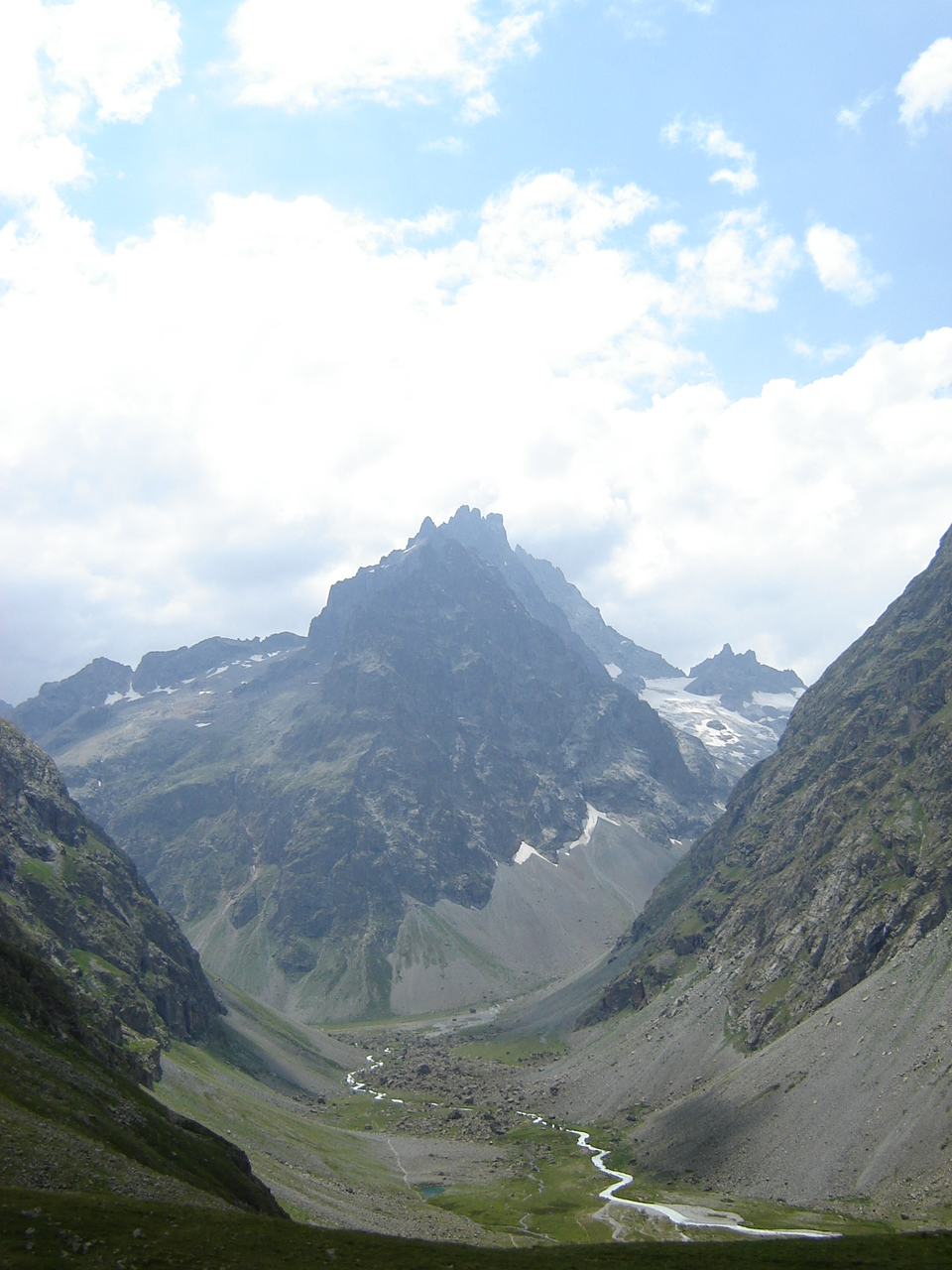 Description:Photographie de la Grande Ruine, Parc National des Ecrins, Alpes françaises Auteur:Rémih Date:15 juillet 2006